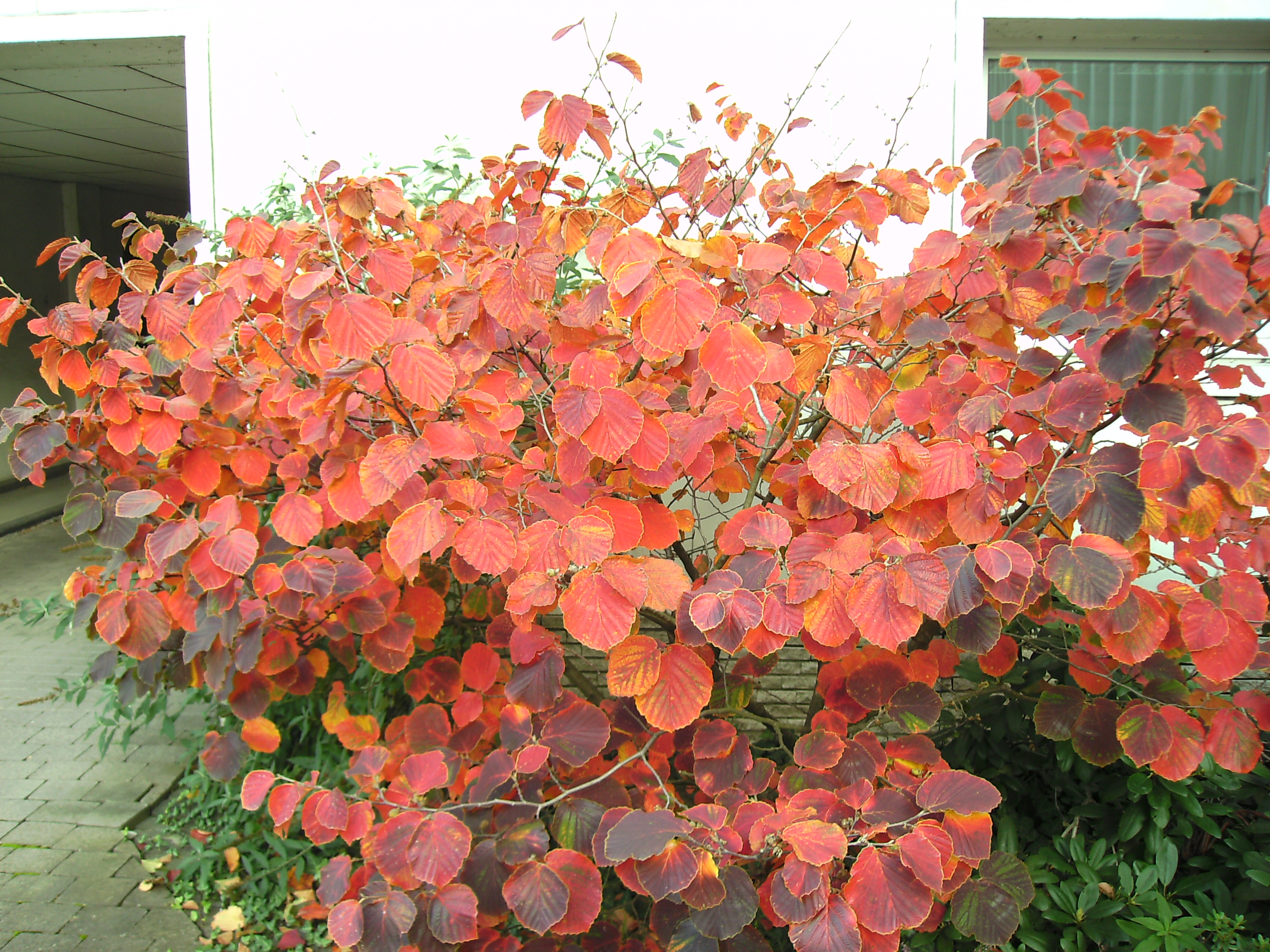 Hamamelis x intermedia (Zaubernuss) im Herbstlaub